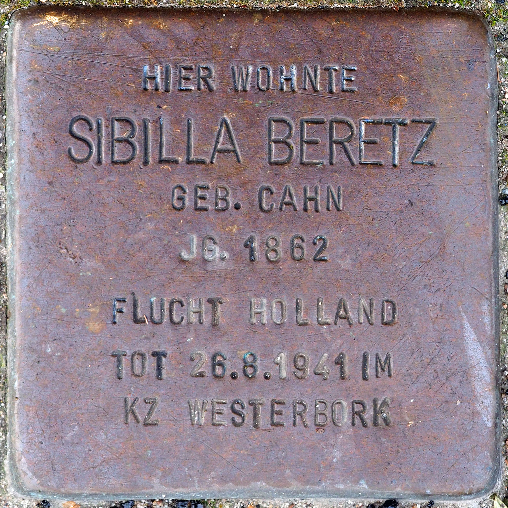 Stolpersteine MG: Berentz, Sibilla